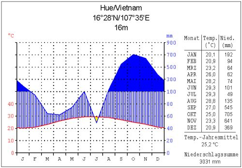 Klimadiagramm Hue